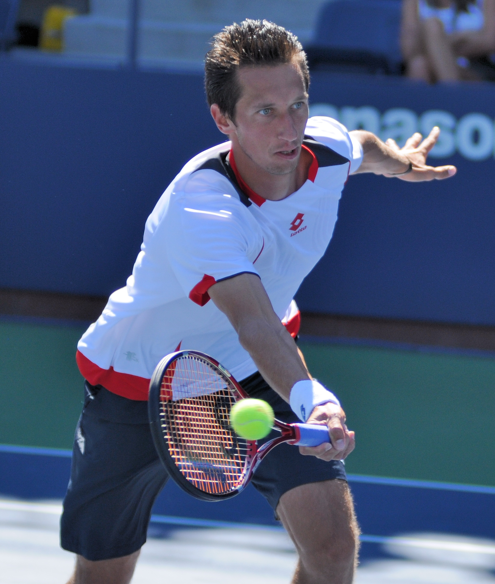 Sergiy Stakhovsky - US Open 2010